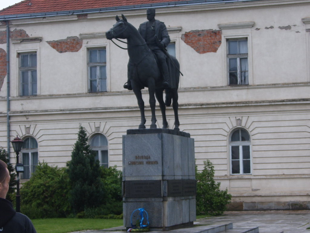 Споменик војводи Живојину Мишићу у Мионици